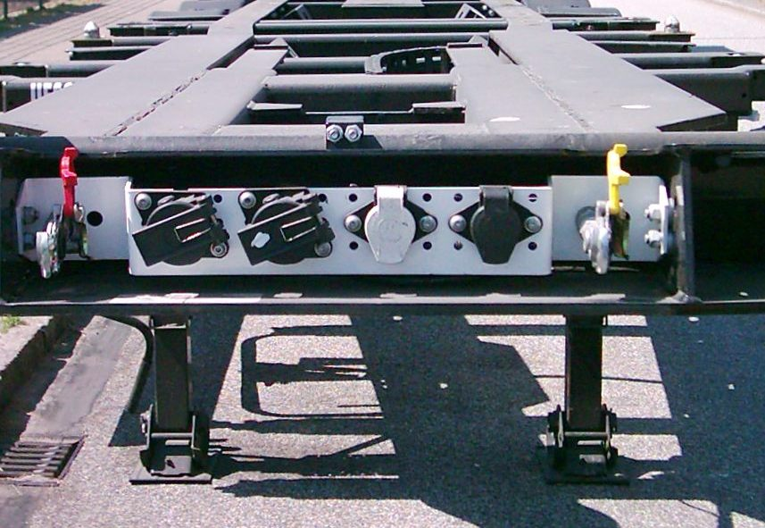 Anschlüsse der Brems- und Elektroanlage an einem Sattelauflieger.